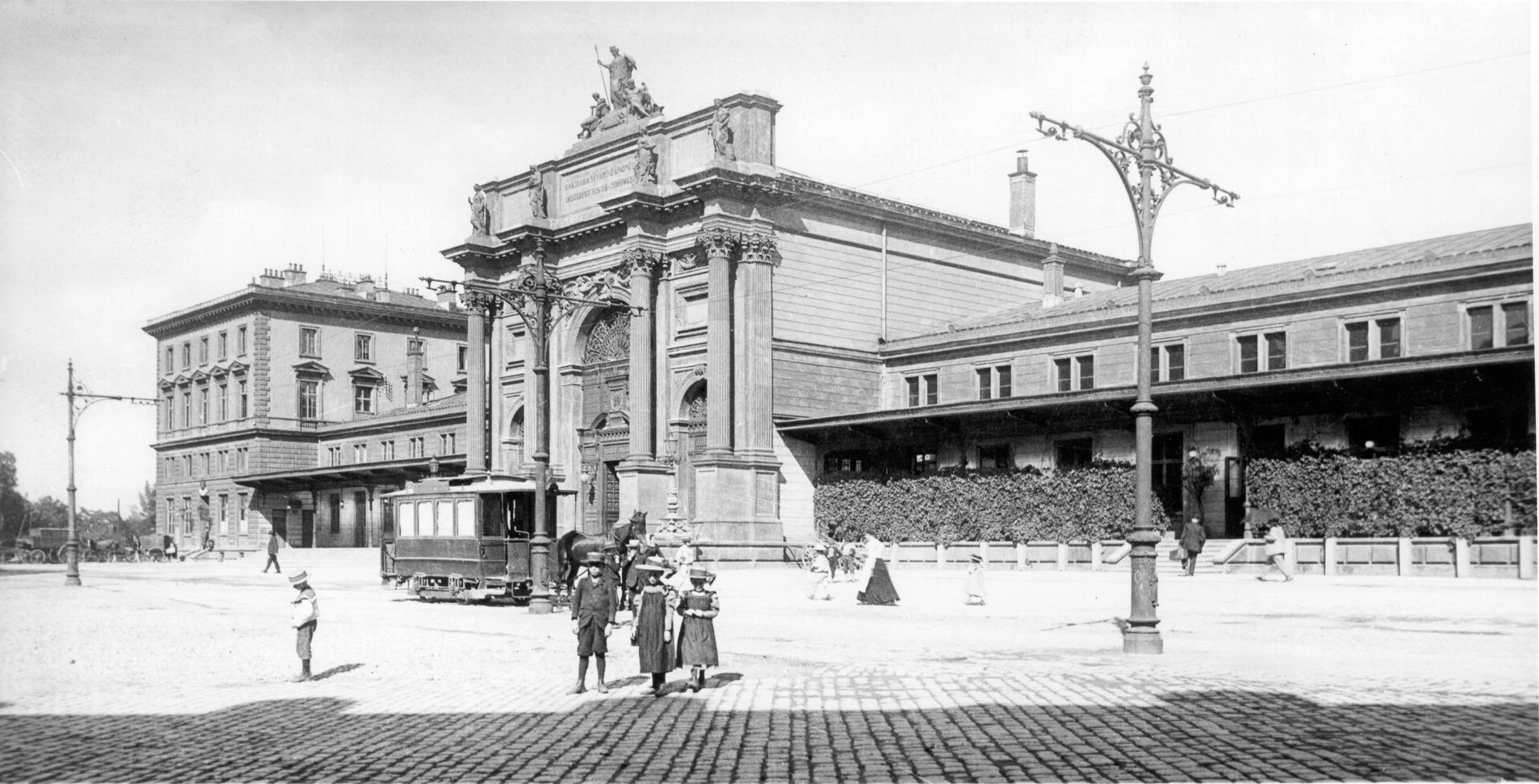 Hlavní budova Těšnovského nádraží